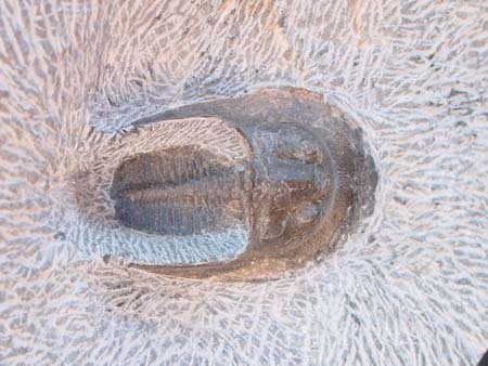 Trilobite ordovicien, Haut-Atlas, Maroc